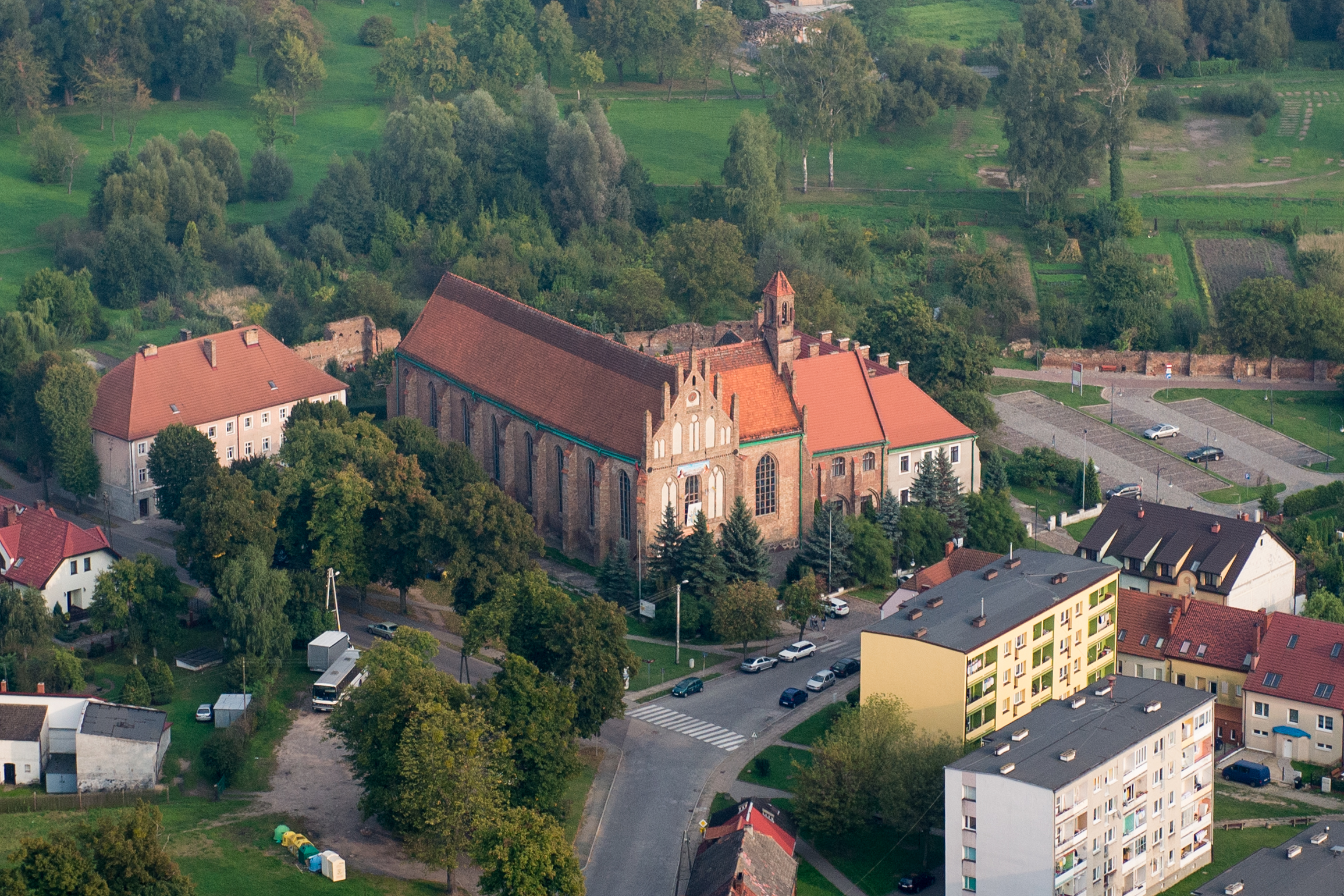 Chojna, kościół, ob. par. p.w. Św. Trójcy, 1 poł. XIV, po 1959